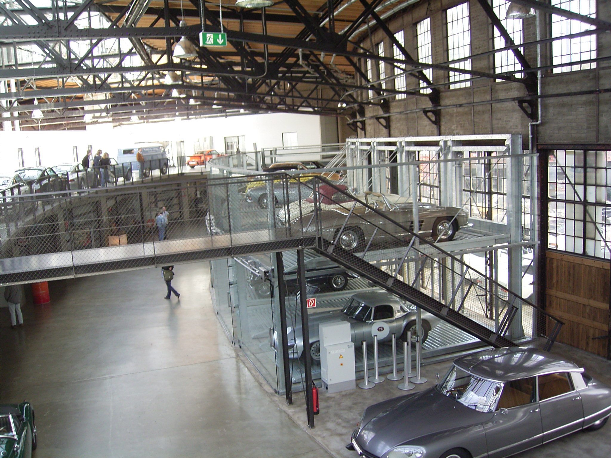 Meilenwerk Düsseldorf Halle von innen.